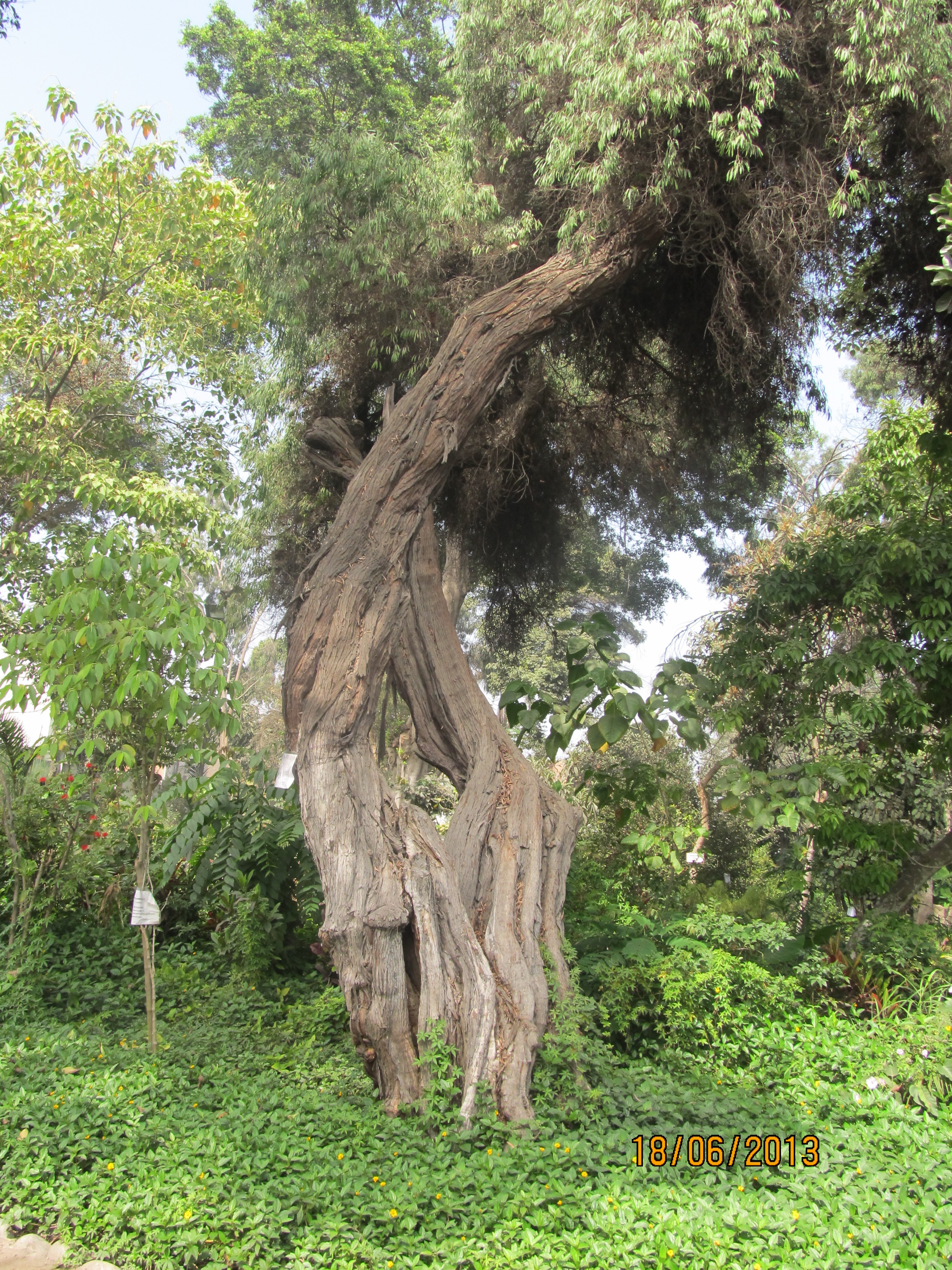 Especie en peligro de extinción, la cual solo quedan algunos ejemplares en el valle del Mantaro. Esta fotografía fue tomada en el jardín botánico de la Facultad de Farmacia y Bioquímica de la UNMSM.